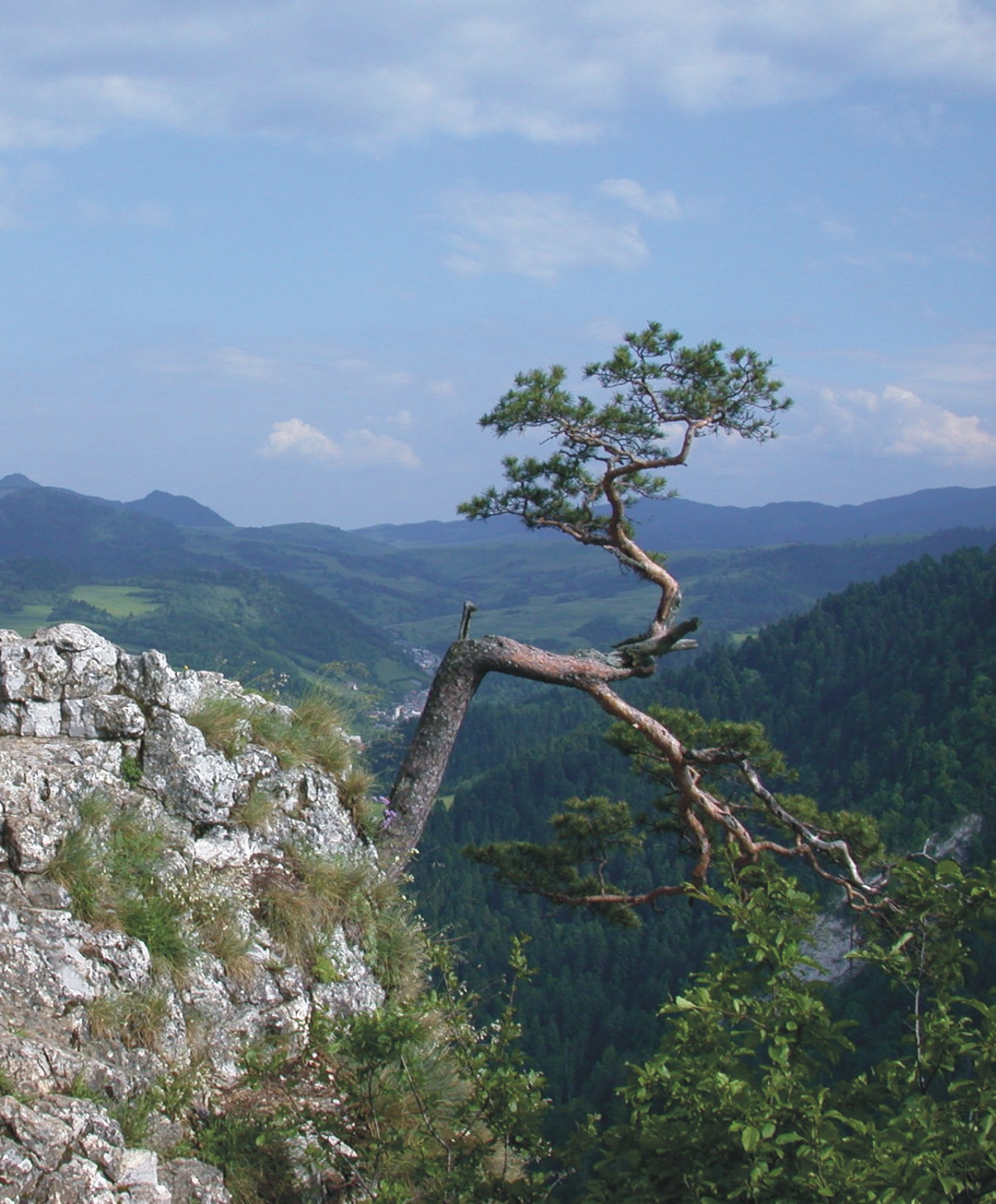 Sokolica